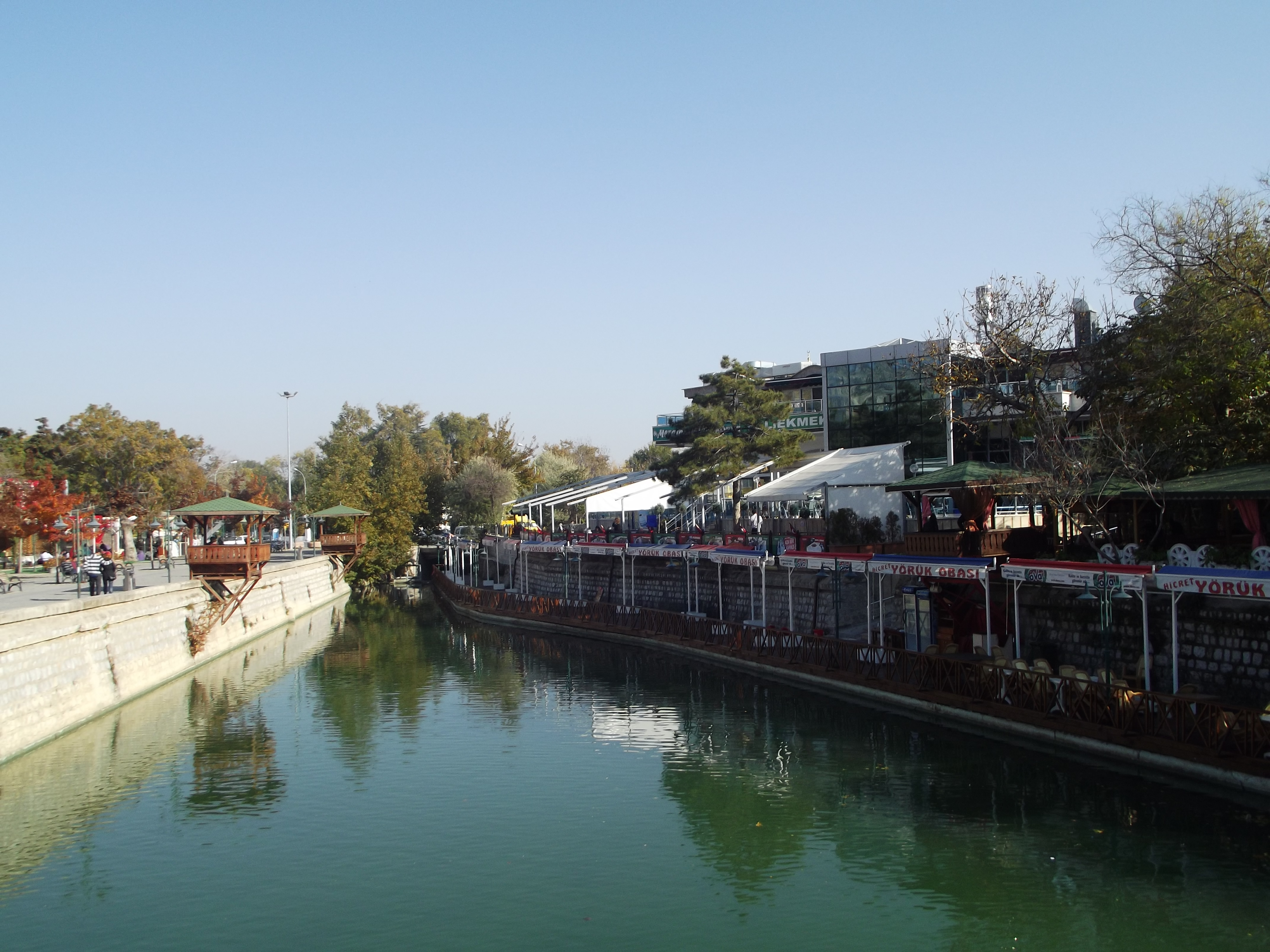 Meram 8